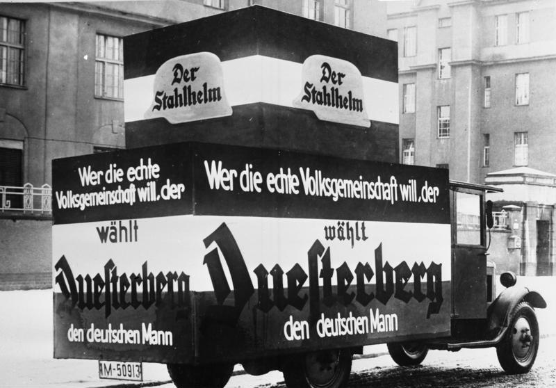 Stahlhelm Kundgebungswagen